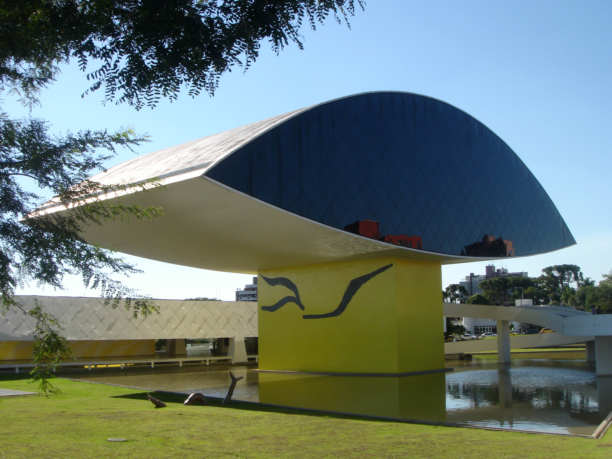 Oscar Niemeyer Museum (NovoMuseu), Curitiba, Brazil